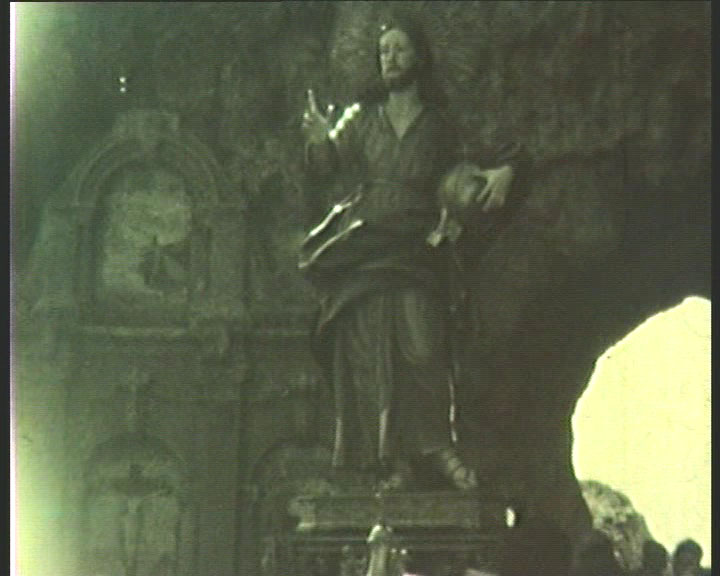 Santo Salvatore alla Cona (Pazzano)